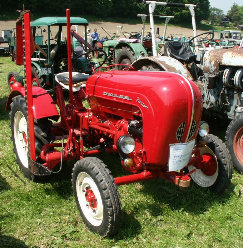 1958 Porsche-Diesel Junior F108, Baujahr 1958